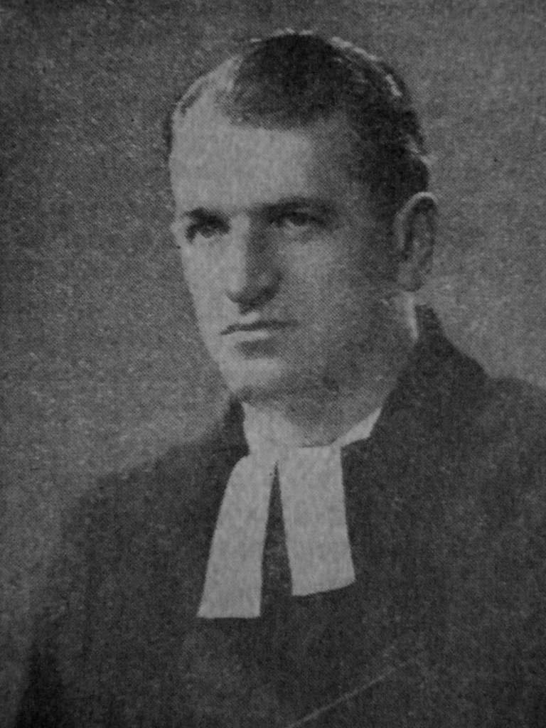 Jerzy Cymorek, Czechoslovak Lutheran bishop